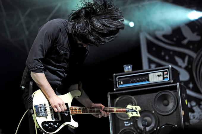 Jesse F. Keeler Parklife Festival 2011